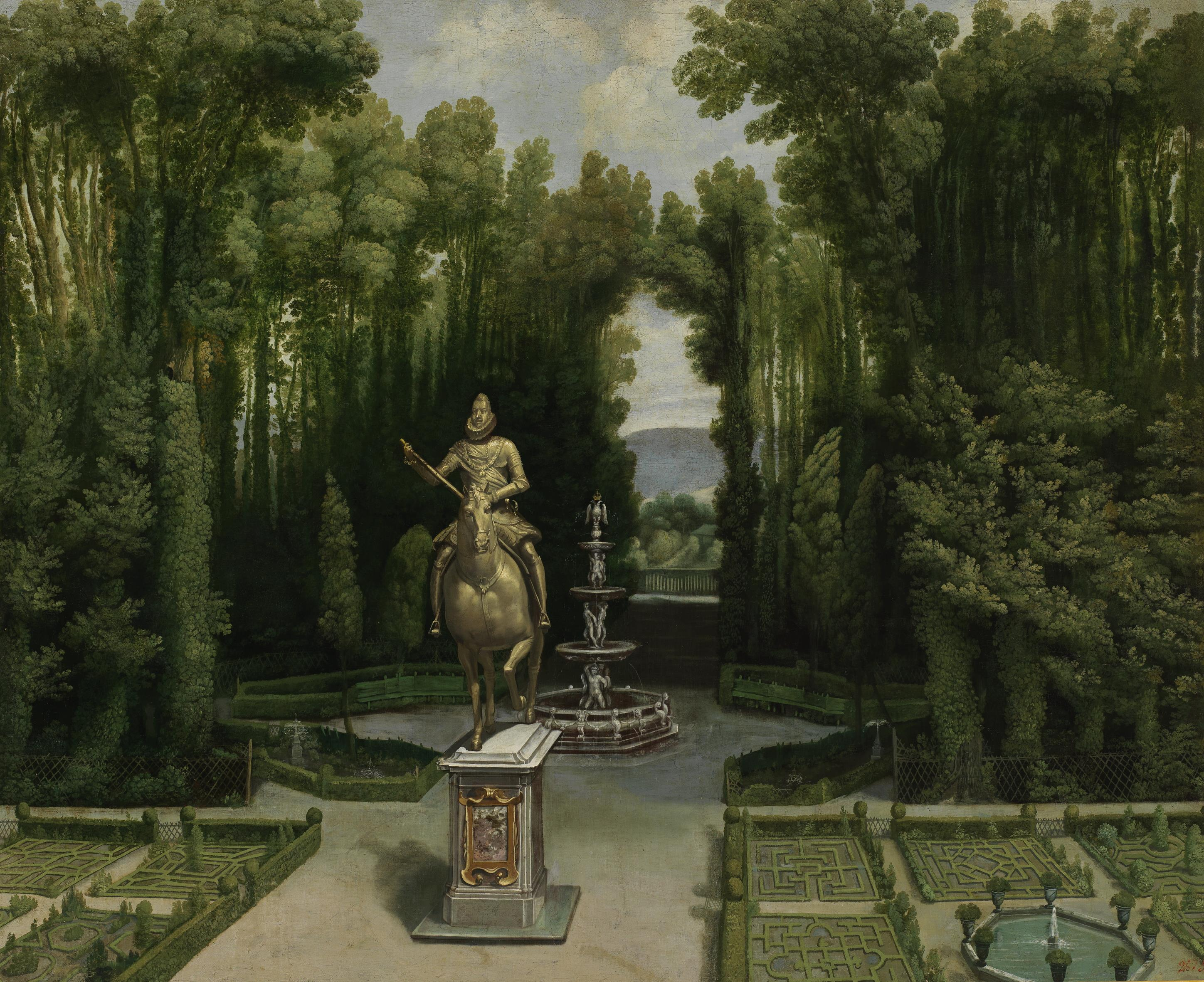 Vista de los jardines de la Casa de Campo con la estatua de Felipe III. Pintura anónima, que se conserva en el Museo de Historia de Madrid (depósito del Museo del Prado). Fue hecha hacia 1634.